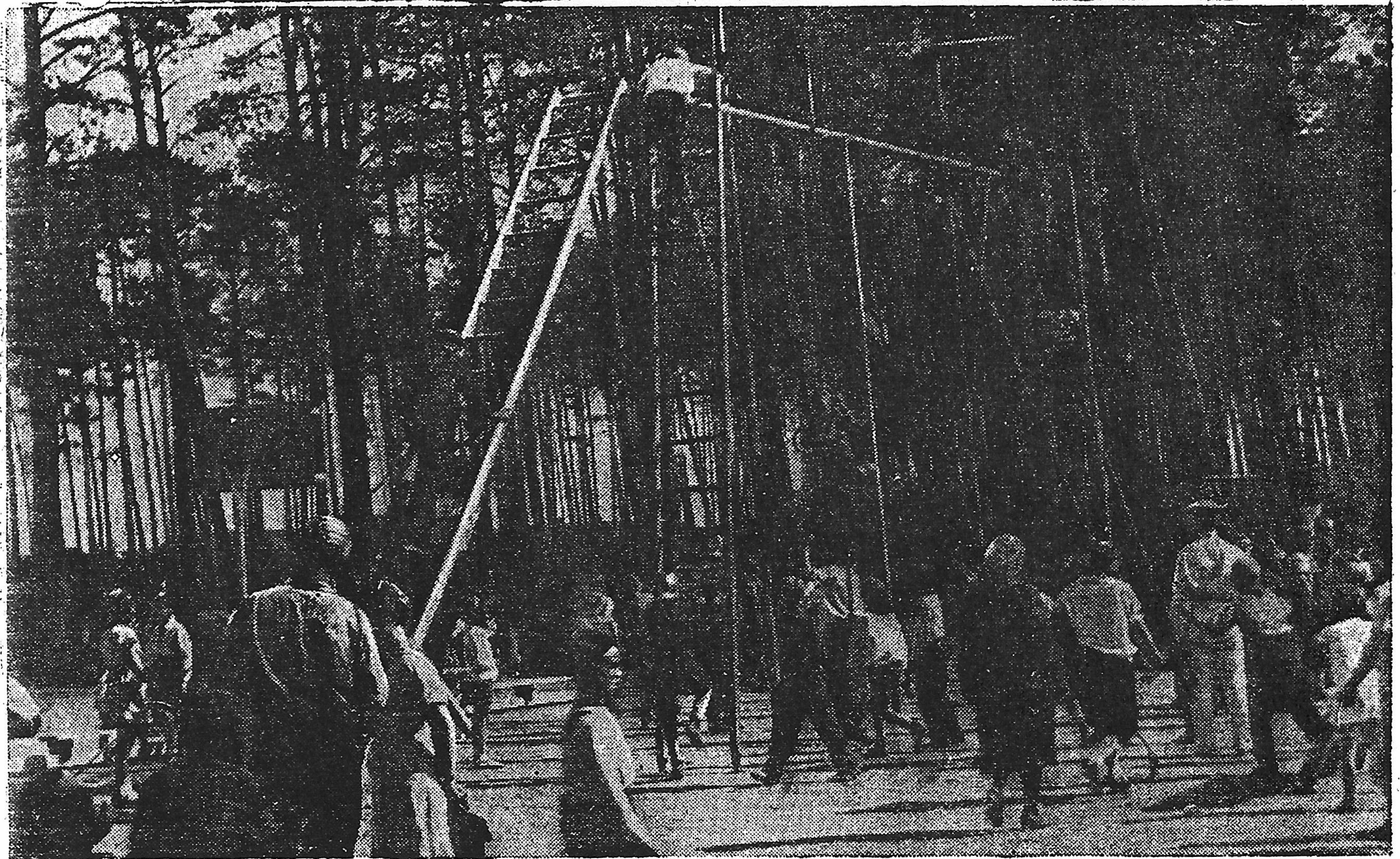 Физкультурный городок детского парка Ленинградского района